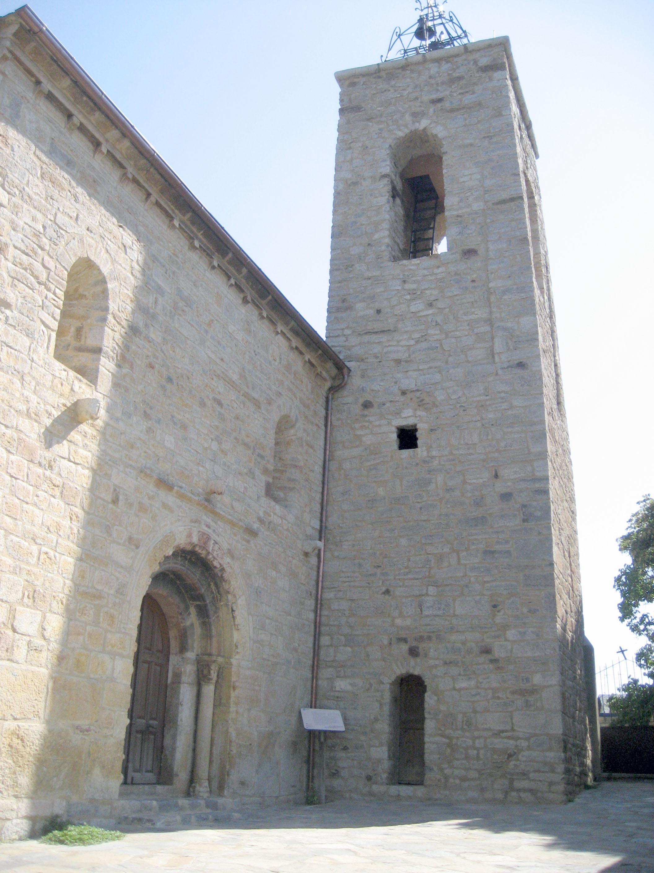 Iglesia de Santa María de All en la Baja Cerdaña (Cataluña) España